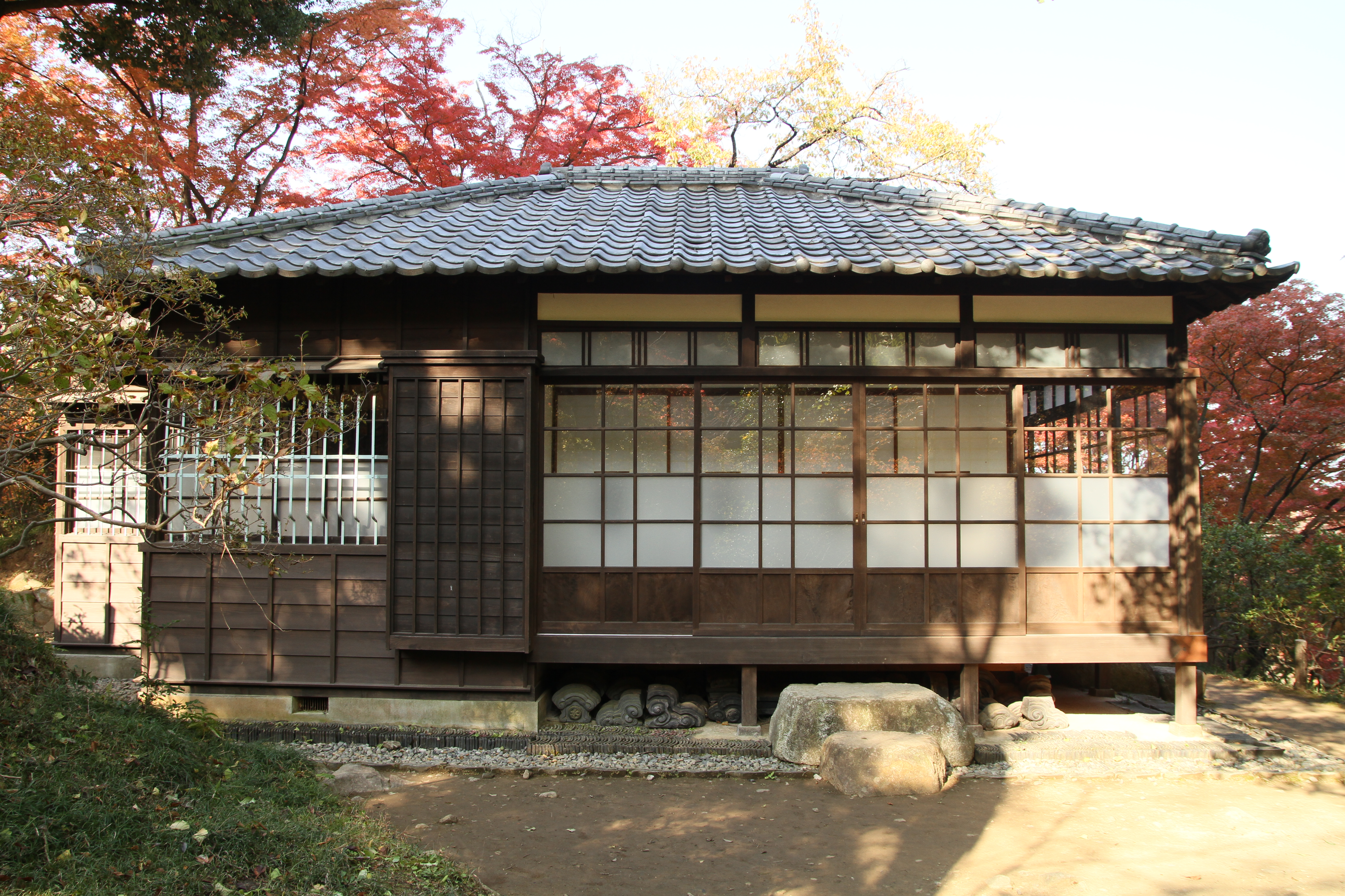 少林山達磨寺の洗心亭